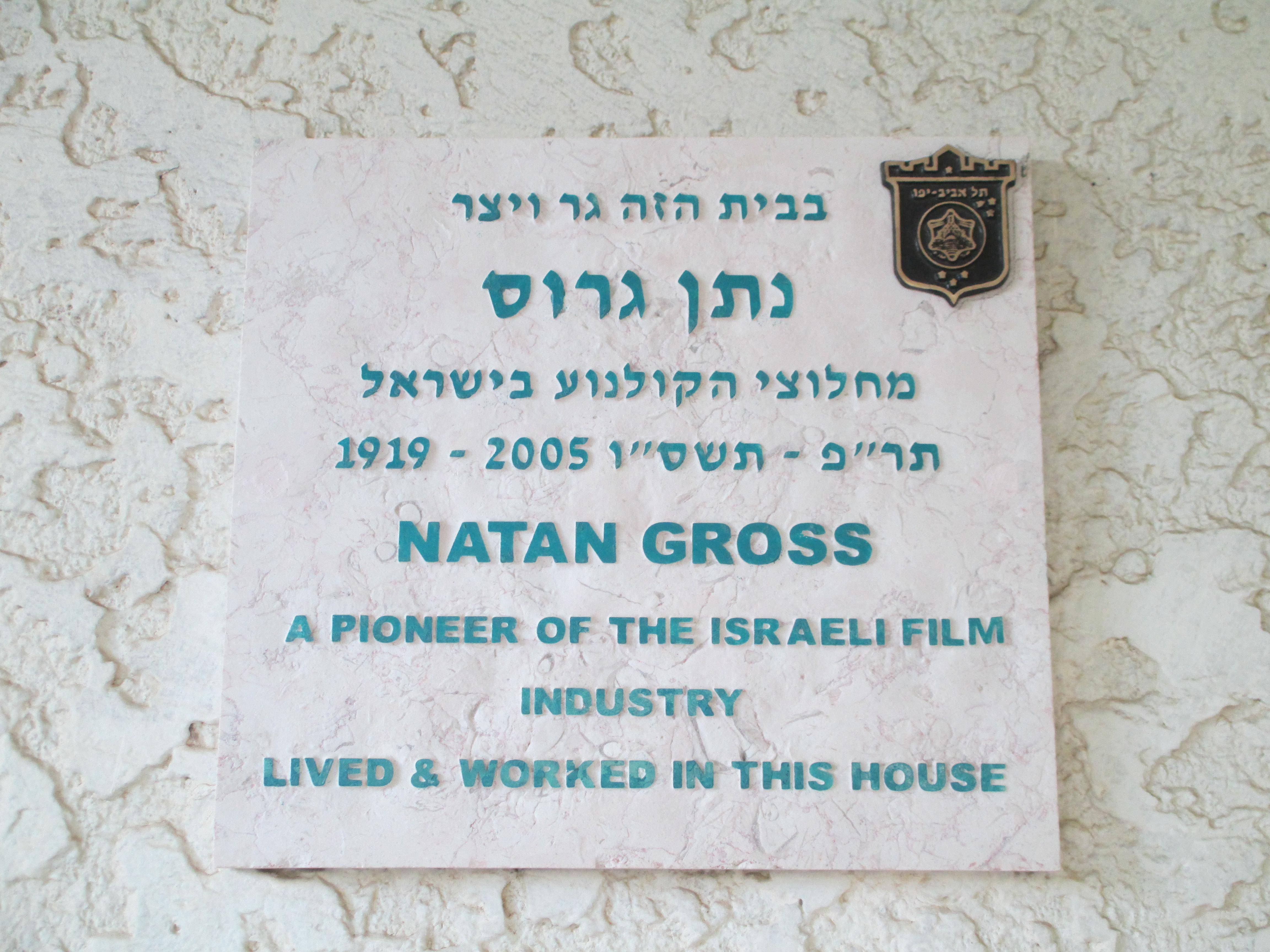 לוחית זיכרון לנתן גרוס בכניסה לביתו ברח' דרך השלום 113 בתל אביב